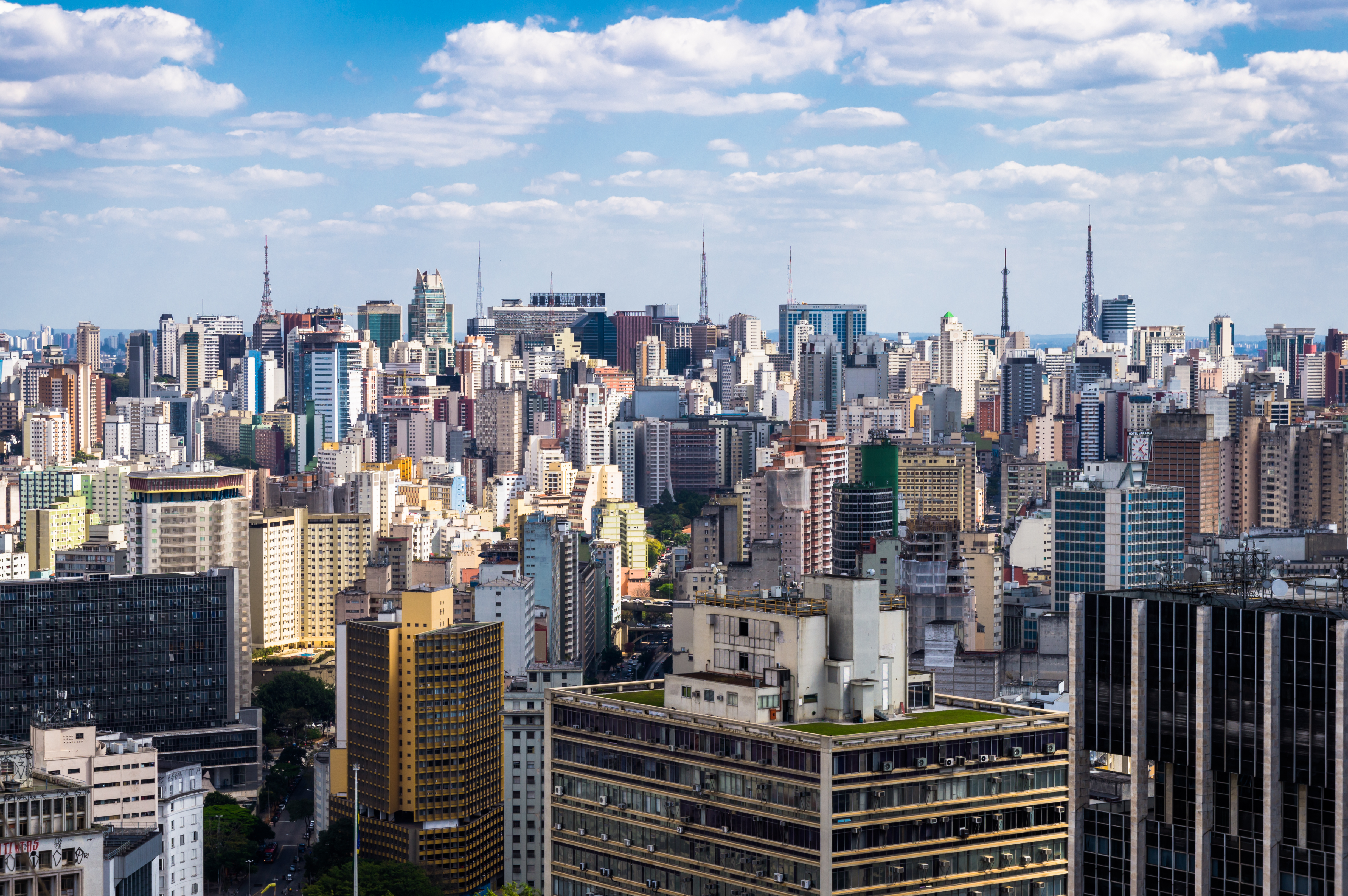 Vista de São Paulo a partir do mirante do Edifício Altino Arantes